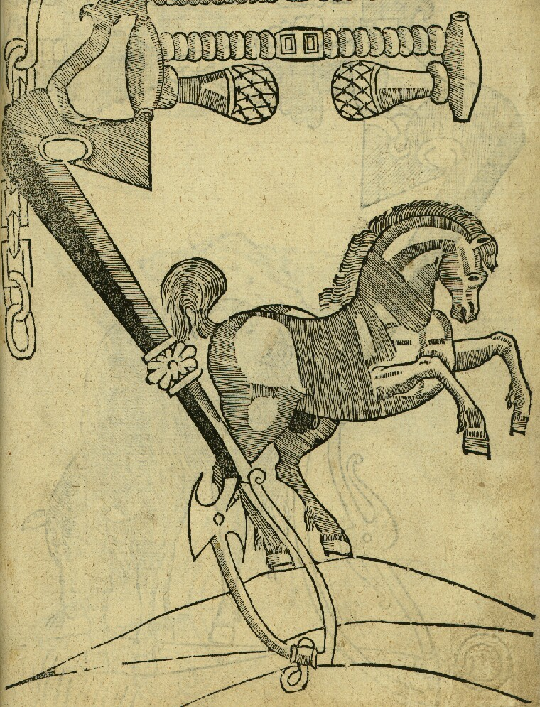 Беларуская (тарашкевіца): Крыштап Дарагастайскі «Гіпіка, альбо Кніга пра коней»